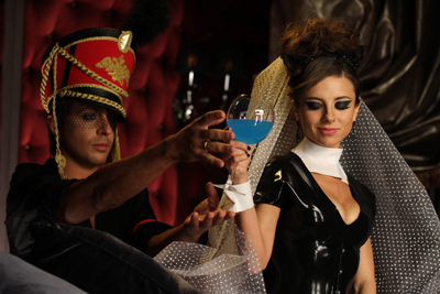 Алексей Романов и Анна Плетнёва на съёмках клипа Роман